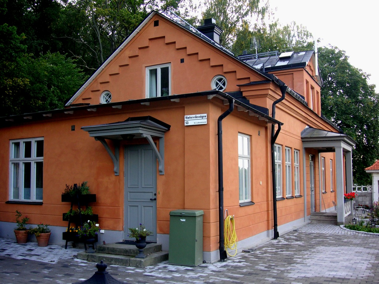 Vinterviken, Laboratoriet